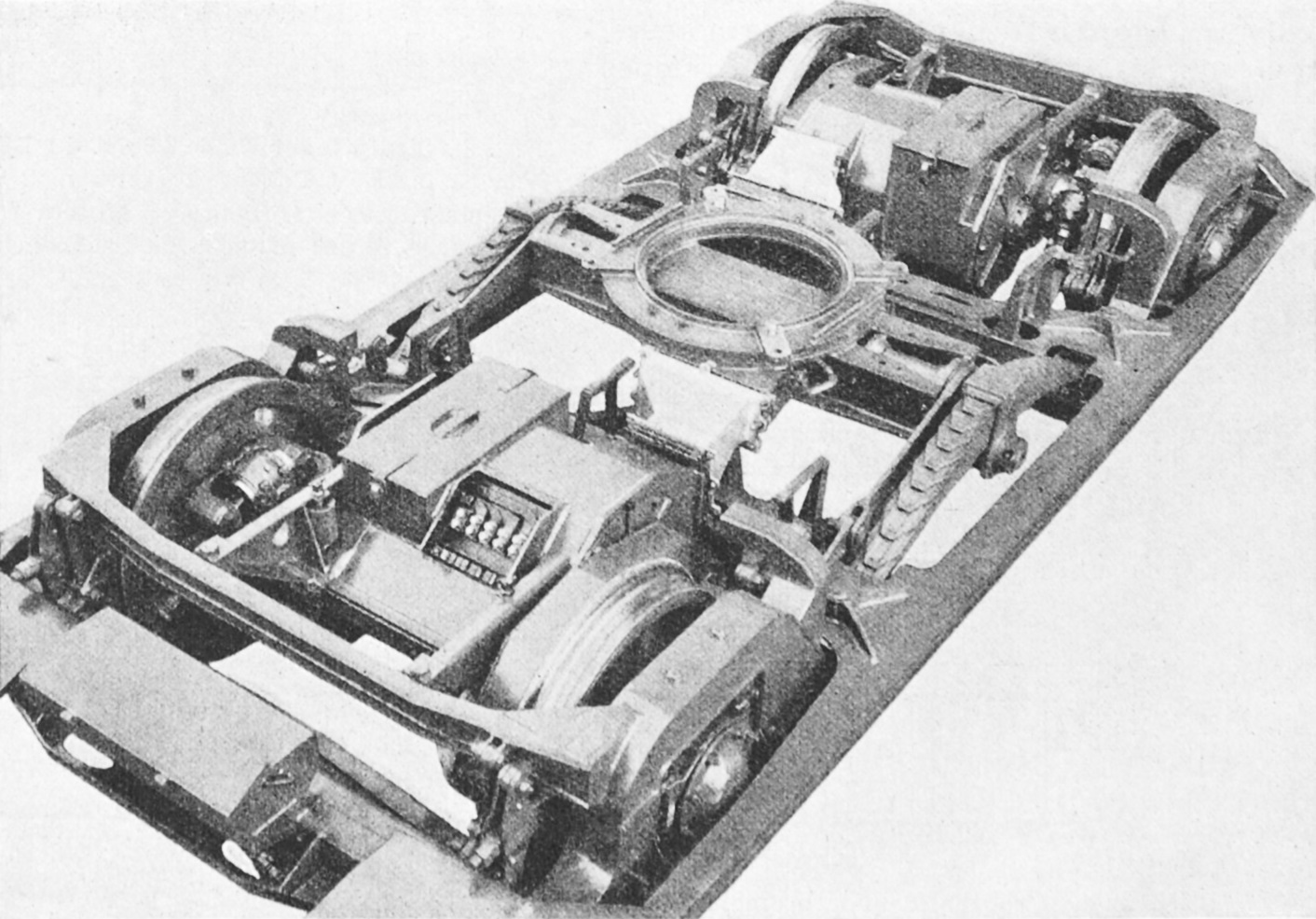 Triebdrehgestell des Blauen Pfeils BCFZe 4/6 der BLS-Gruppe